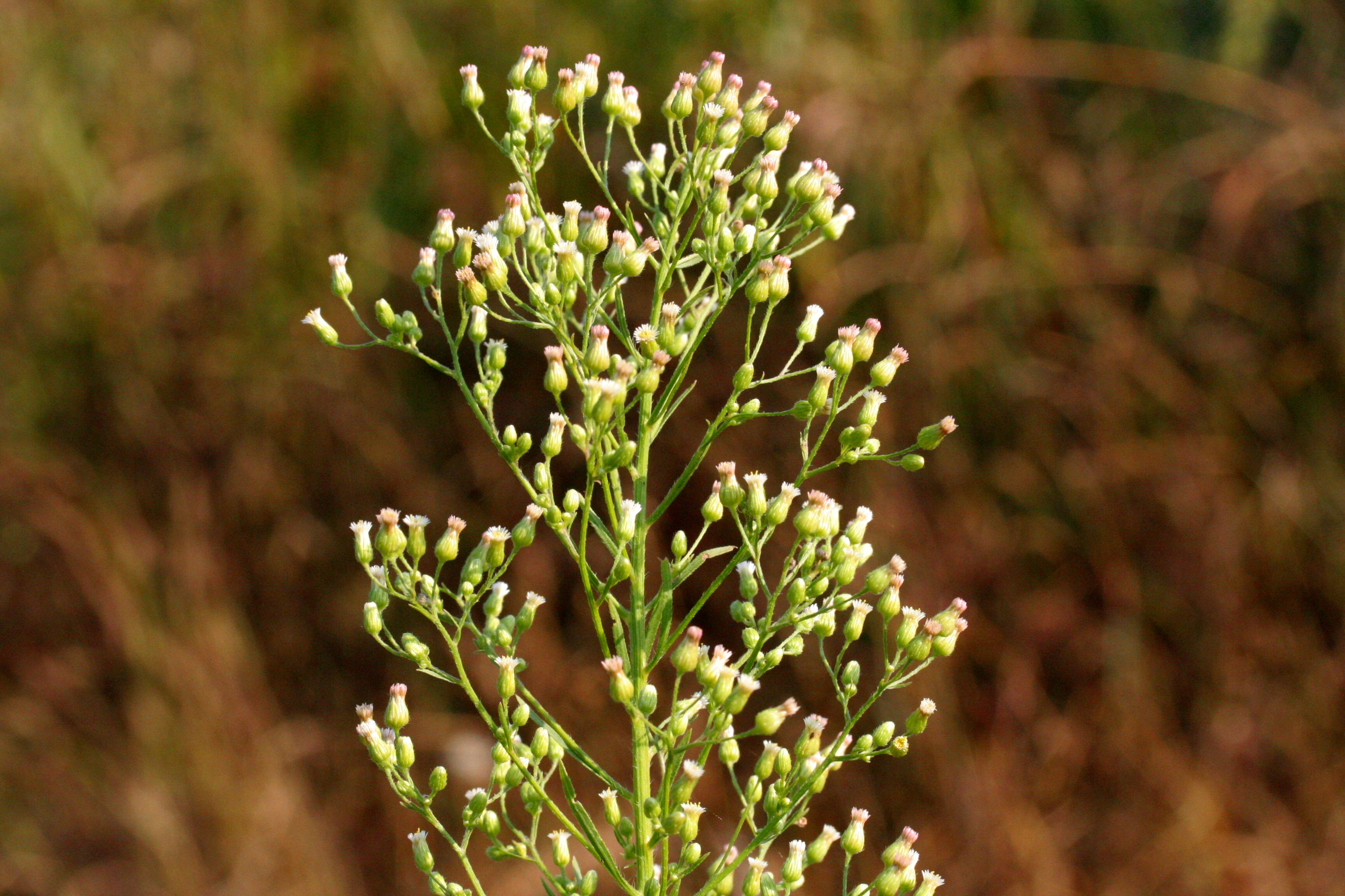 Conyza canadensis (Saeppola canadese) località Casteldardo, comune Trichiana, prov. Belluno, quota 389 m s.l.m.